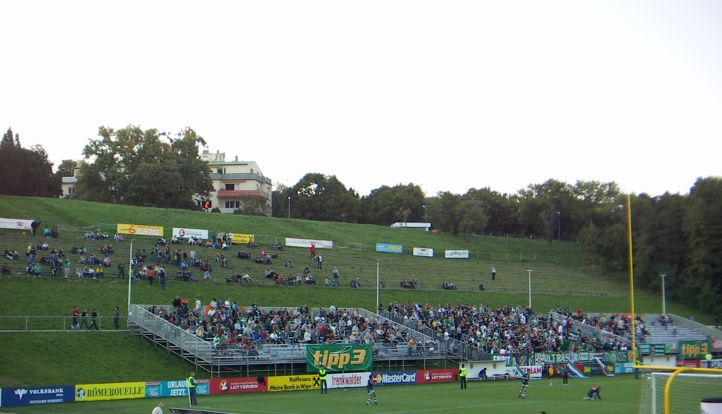 Naturtribüne_Hohe_Warte